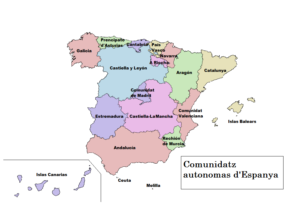 Aragonés: Comunidaz autonomas d'Espanya.